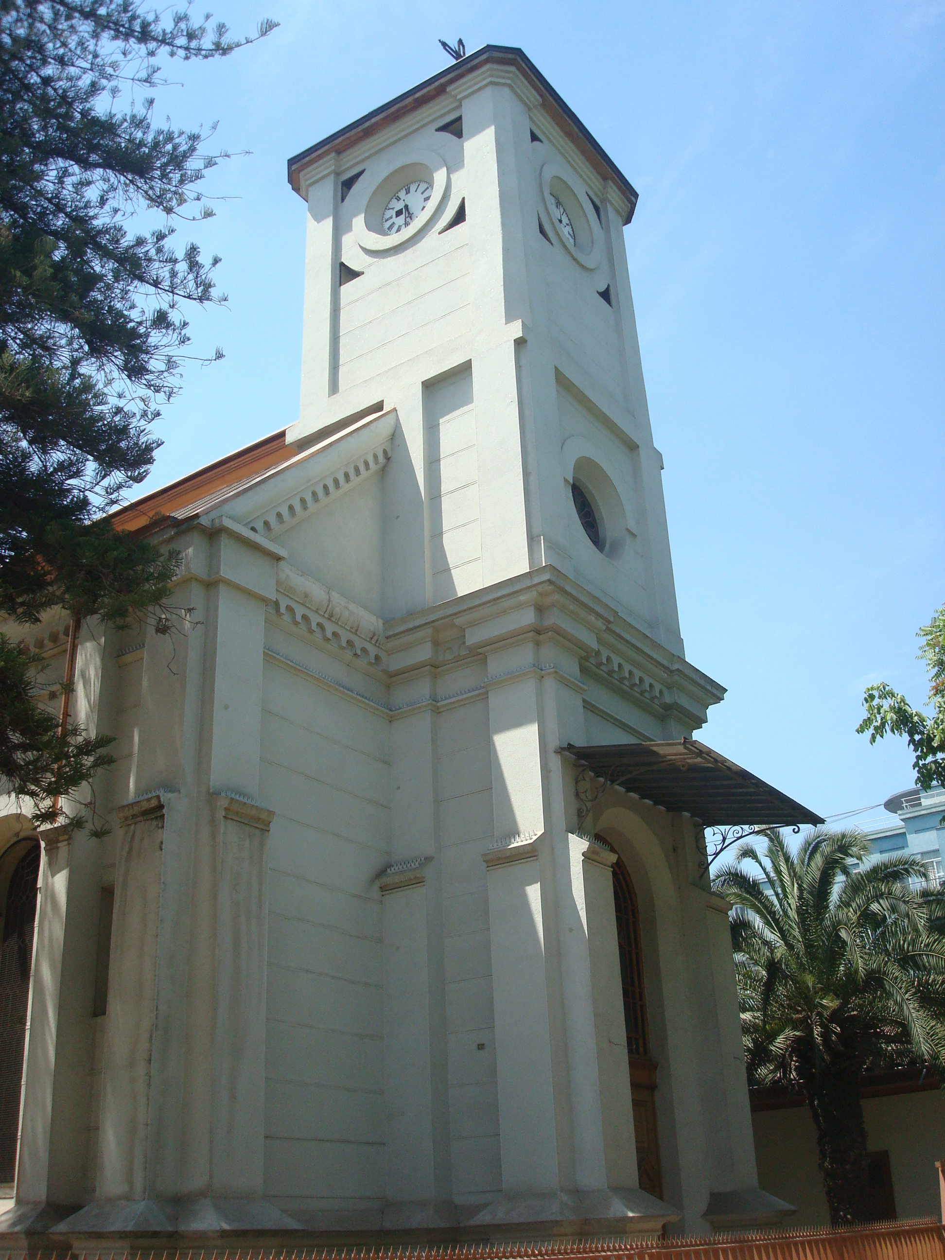 Capilla San Vicente de Paul, Independencia, Santiago de Chile